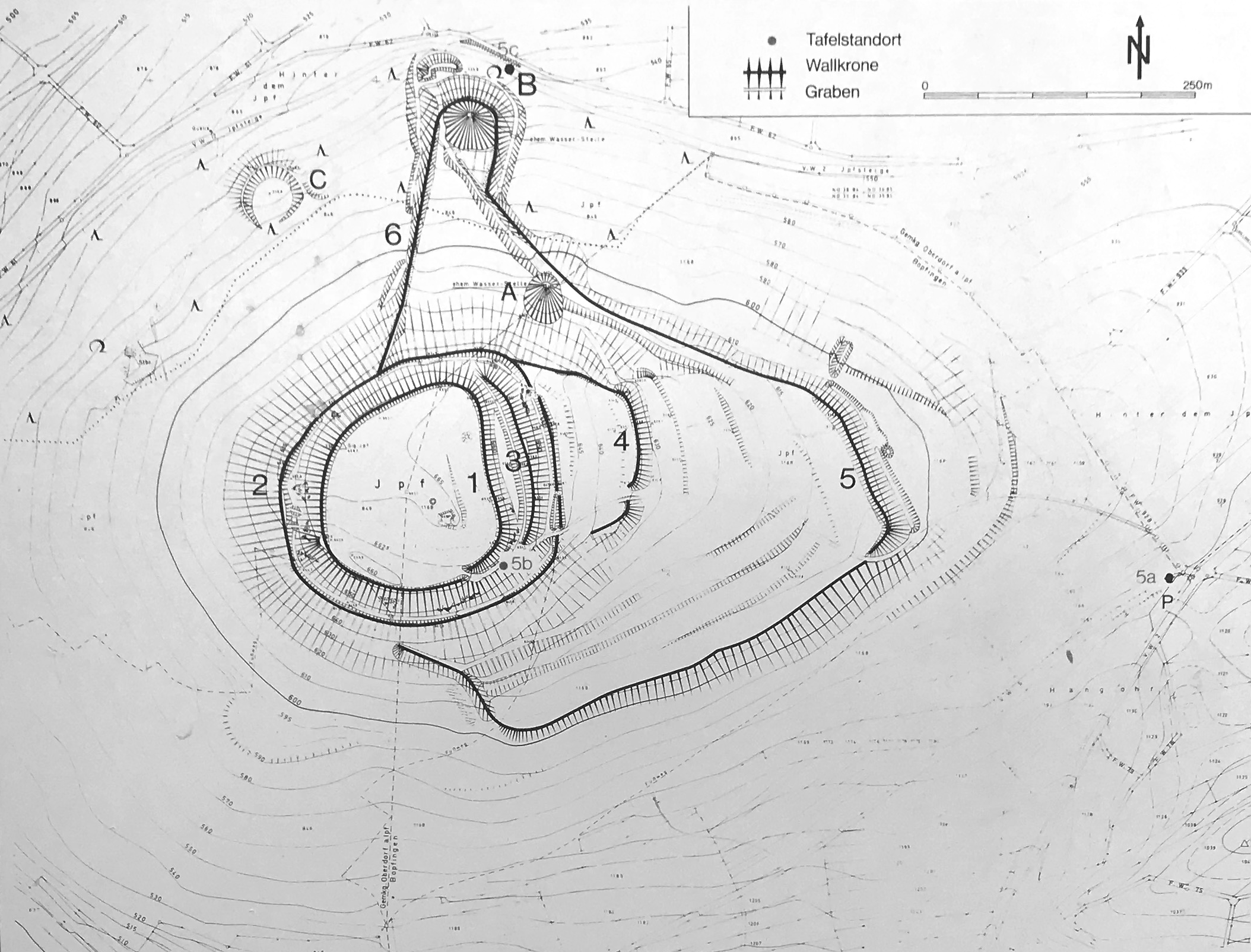 Befestigungssystem des Ipf1 = Randwall um das Gipfelplateau2 = 15 Meter tiefer liegender Hanggraben3 = Zweiter Zwischenwall4 = Dritter Zwischenwall5 = Unterste Befestigung6 = Bergab laufender Wall mit GrabenA = Trichtergrube „Löffel“B = Trichtergrube „Pfanne“C = Trichtergrube „Kessel“